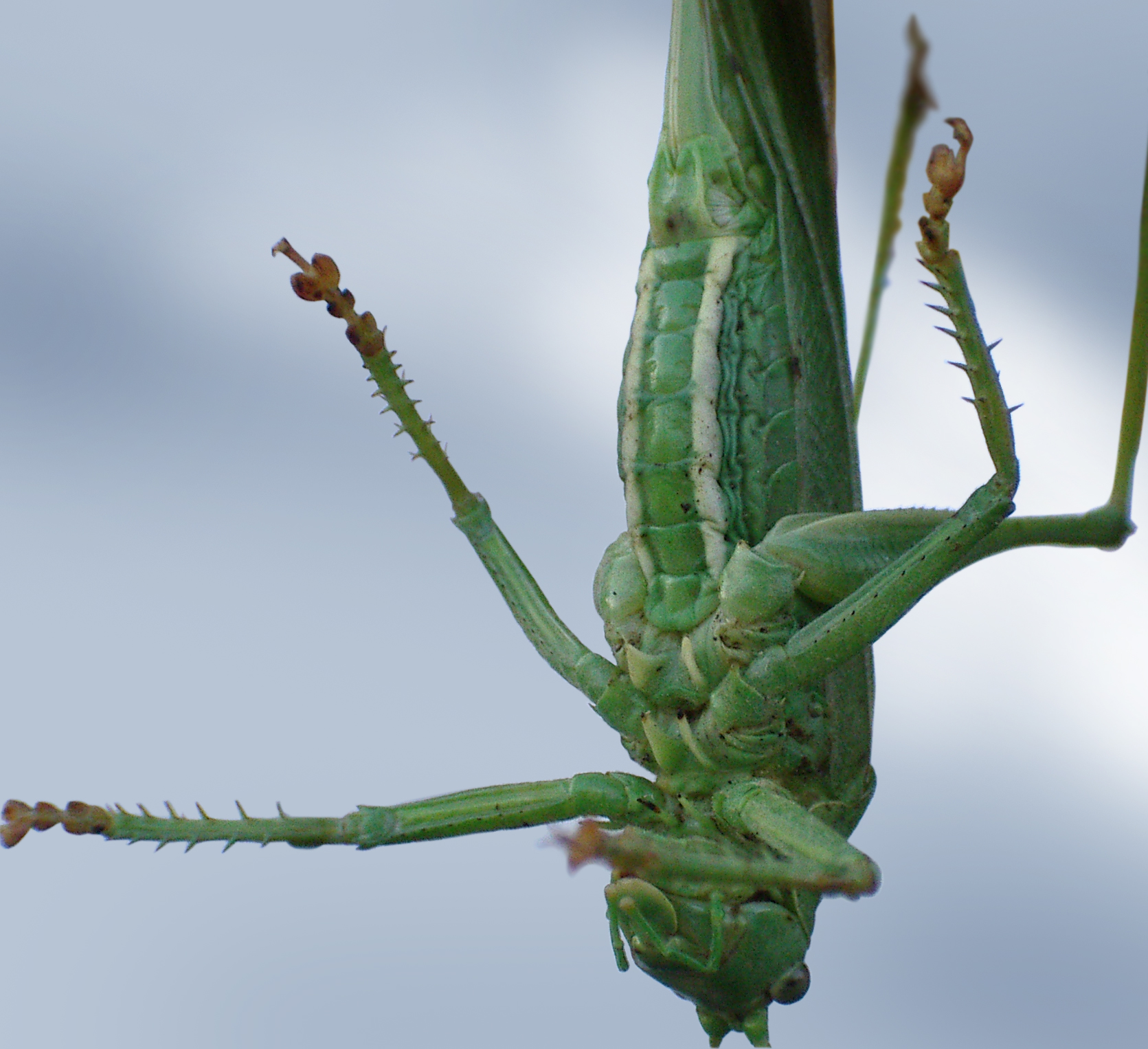 Przedstawiciel rodziny pasikonikowatych (Tettigoniidae) Autor: Ssawka Grafika udostępniona na licencji GFDL